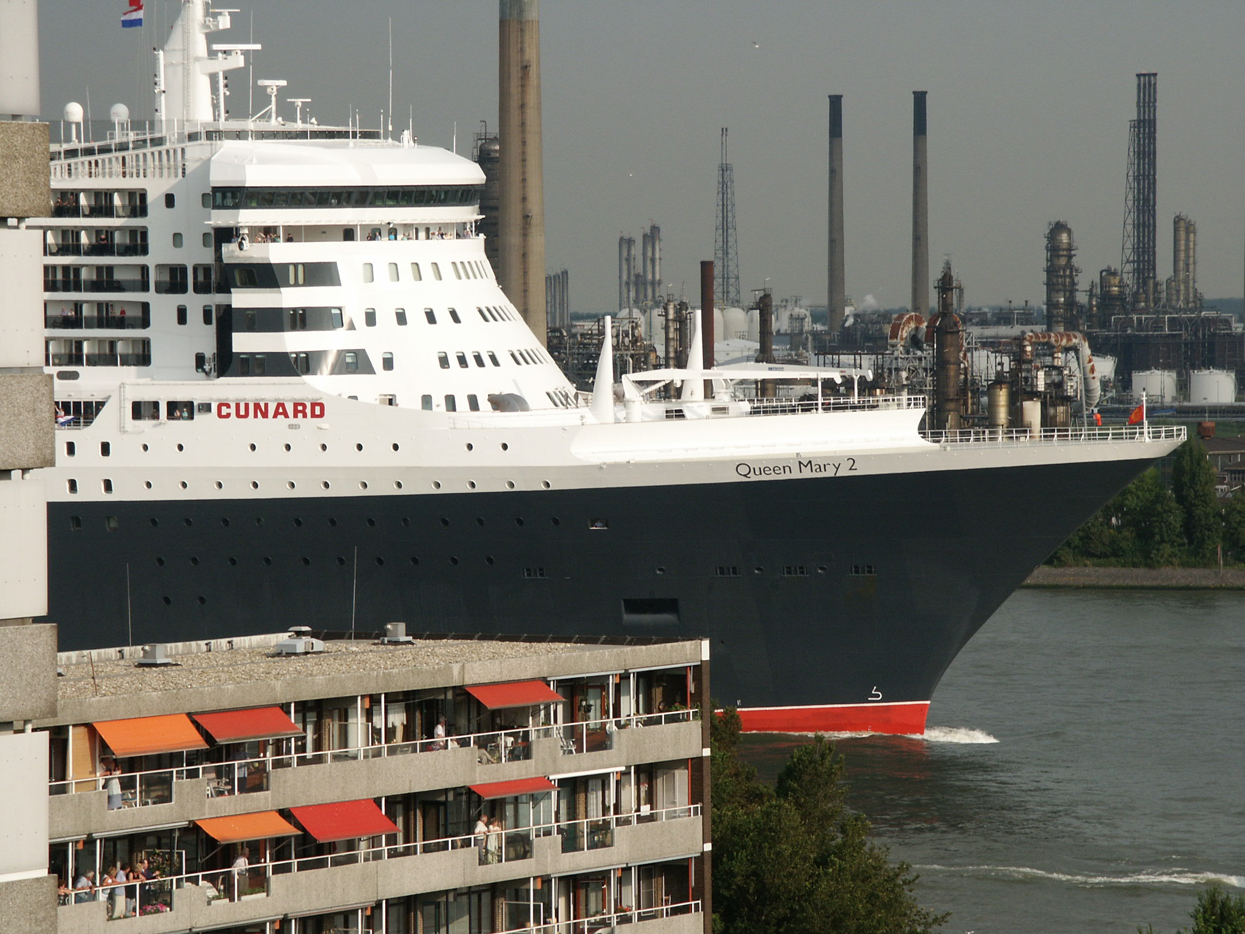 RMS Queen Mary 2 in Vlaardingen